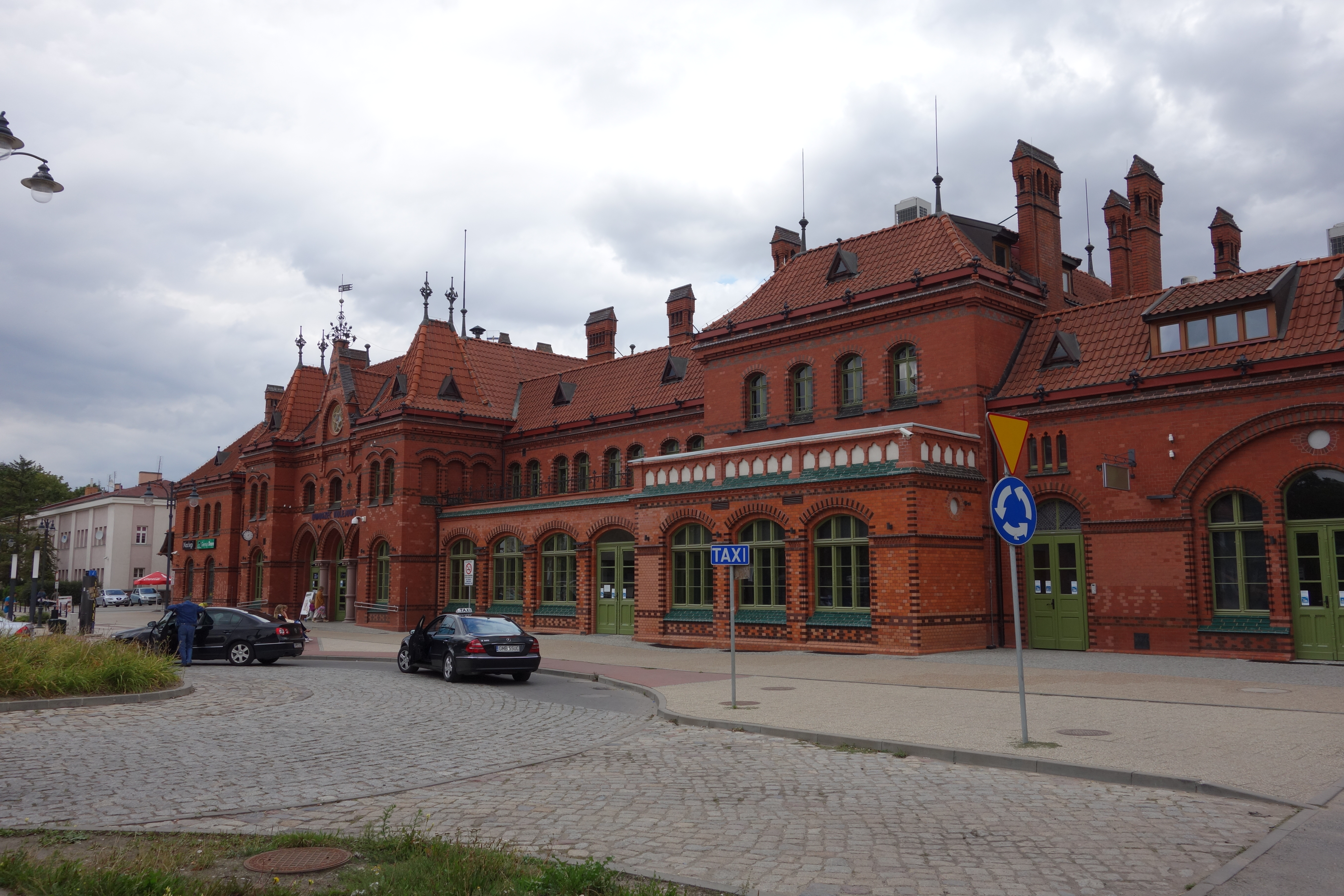 Malbork - dworzec kolejowy , You can see all photographs in category Wikiekspedycja kolejowa 2014.